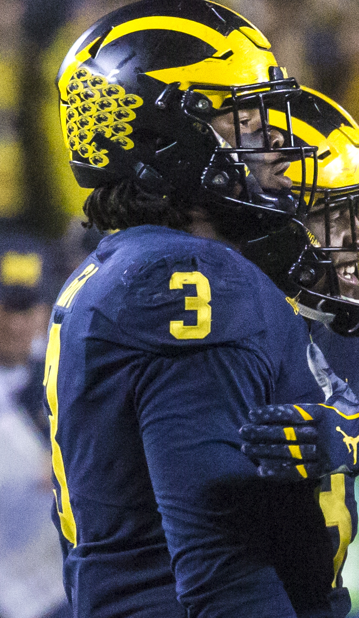 PAB_FBCvsMinnesota2017_97